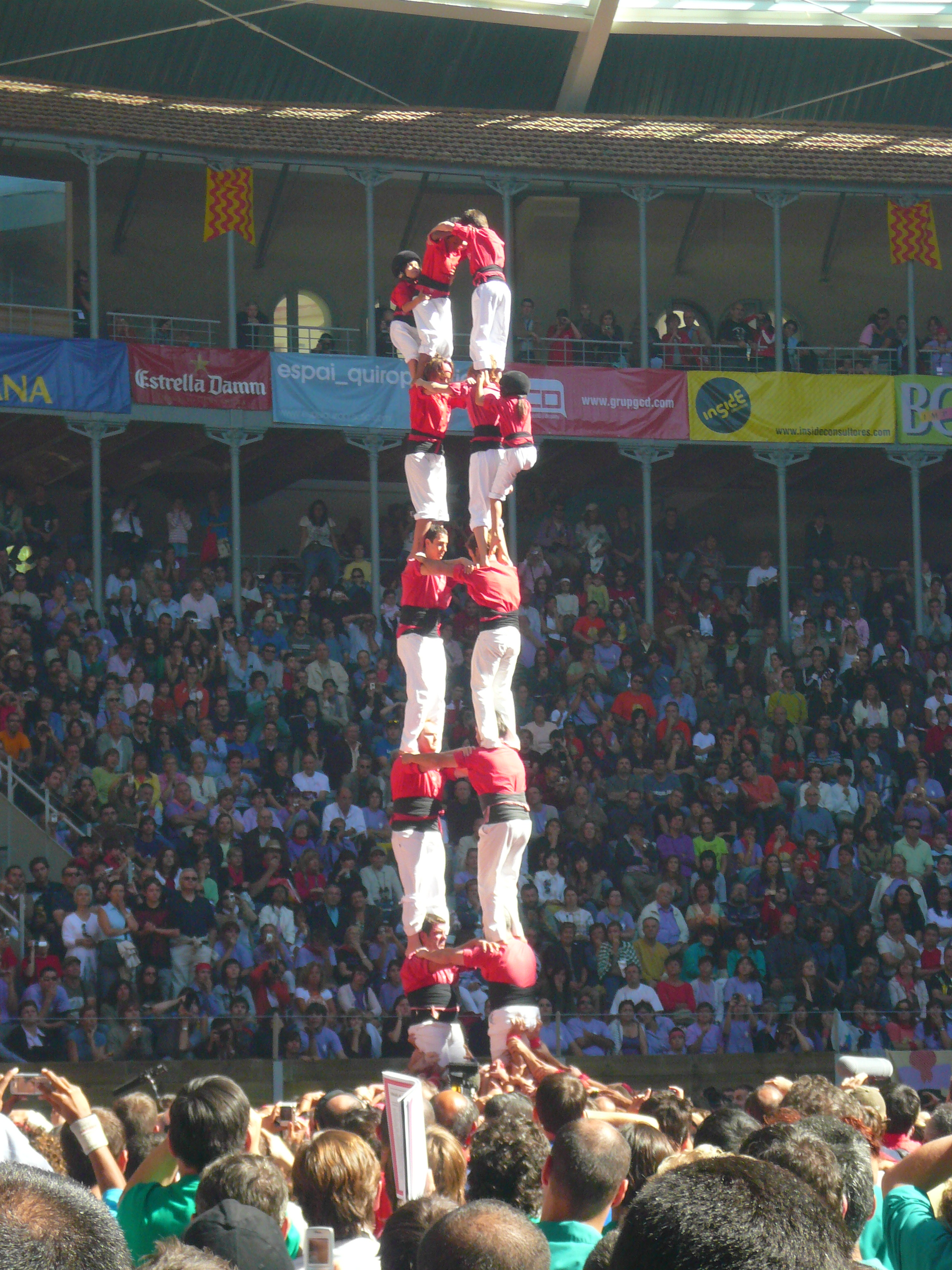 Concurs de Castells 2008, a la plaça de Toros de Tarragona Object location41° 06′ 51.64″ N, 1° 14′ 43.03″ E